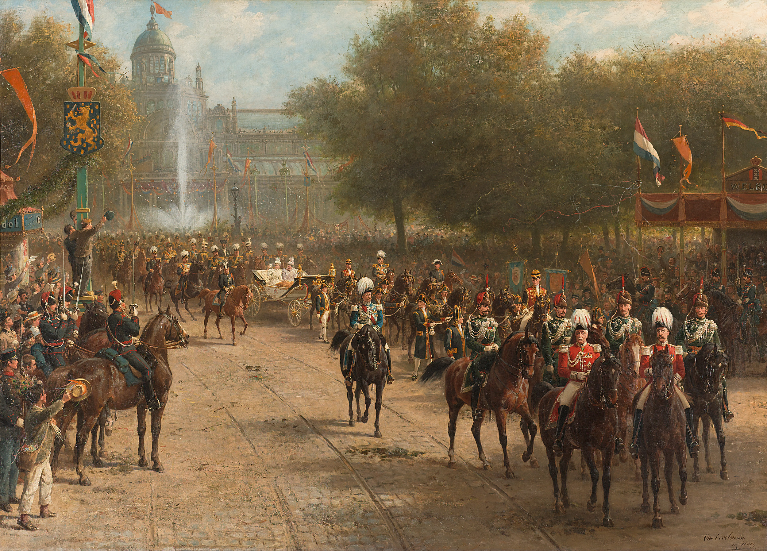 Het Frederiksplein te Amsterdam tijdens de intocht van koningin Wilhelmina, 5 september 1898. Koningin Wilhelmina zit met Emma in een rijtuig, de crème calèche, getrokken door acht paarden. Voor en achter de koets een escorte van ruiters. Rechts een overdekte stand voor genodigde gasten, De stoet rijdt de Utrechtsestraat in, op de achtergrond het Paleis voor Volksvlijt.